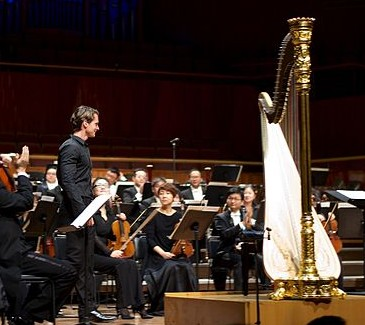 Photo de commons de X de maistre recadrée